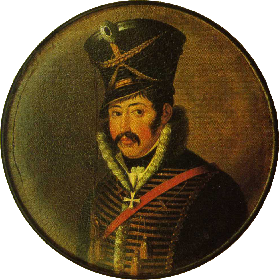 Ferdinand von Schill. Schnupftabakdose, Firma Stobwasser, 1. Hälfte des 19.Jhdts.